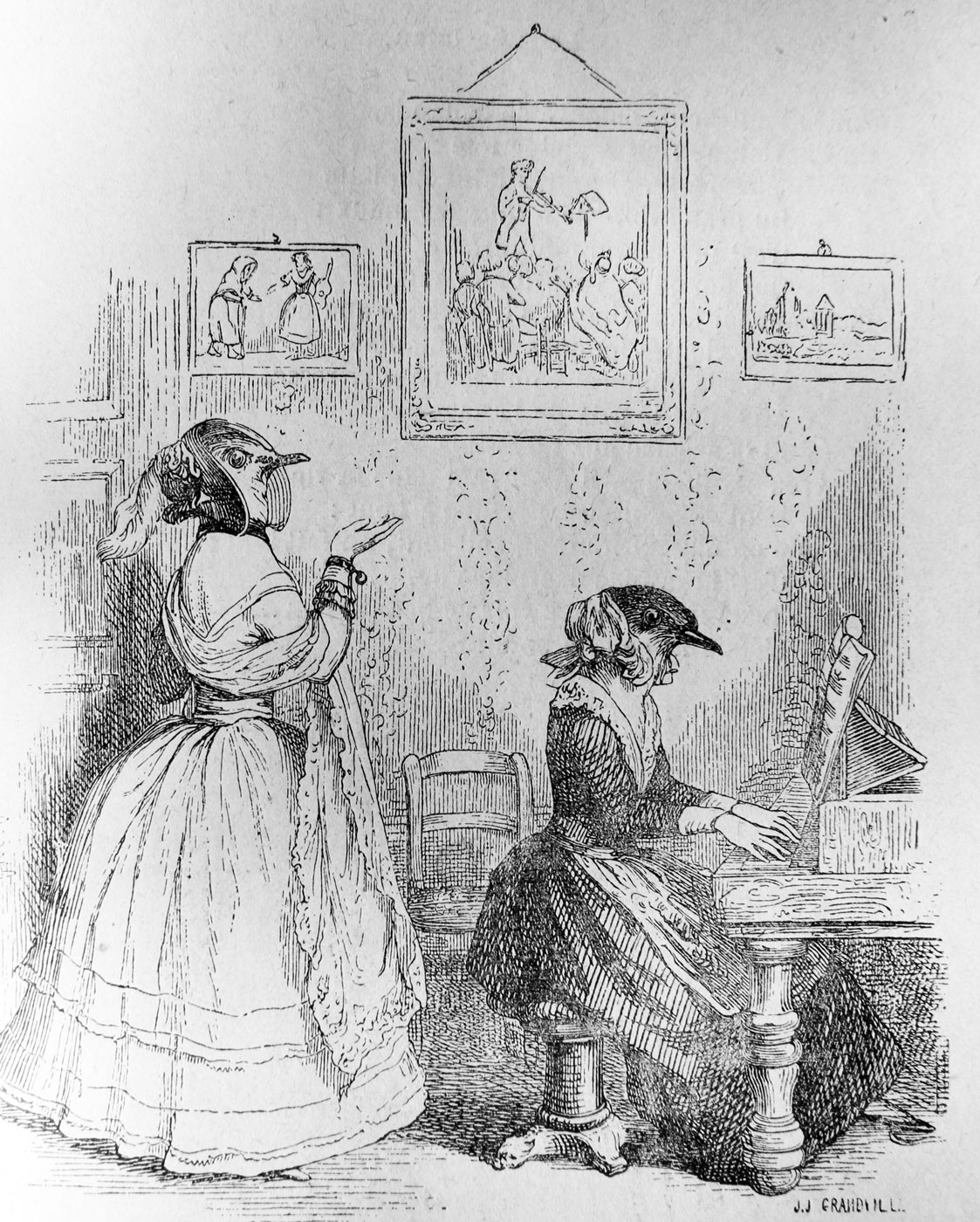 Illustration de Grandville pour les fables de Florian. Source: Oeuvres de Florian, Paris, Paul Brodard, 1913.